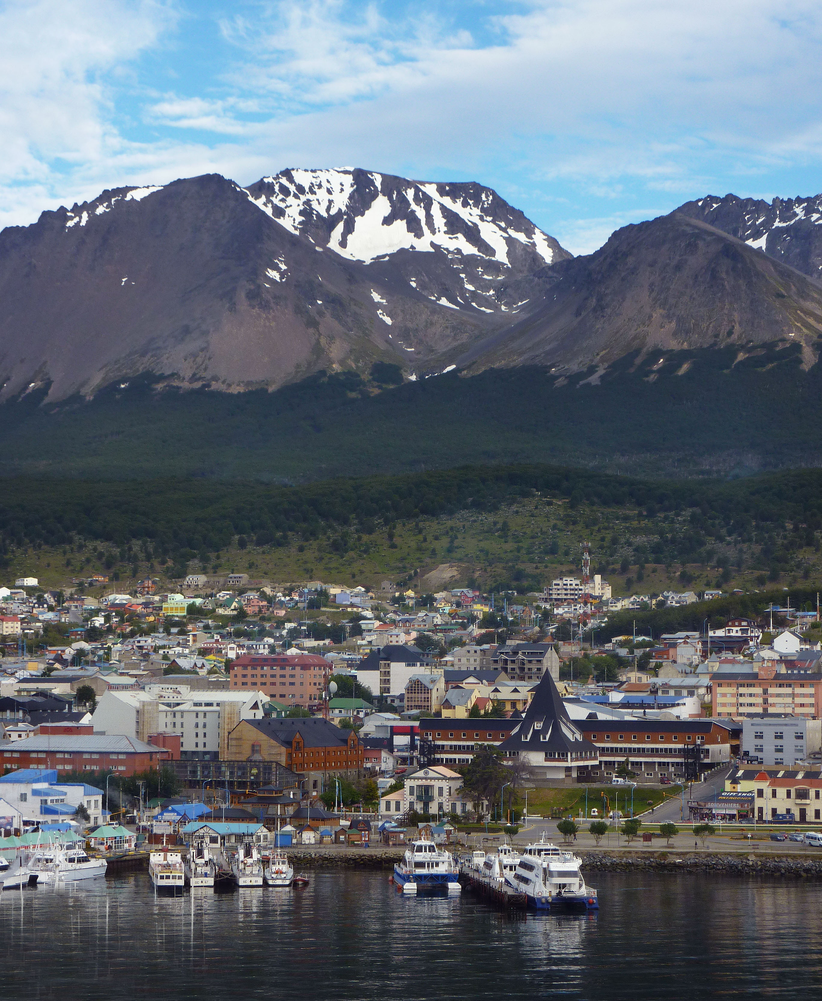 Antarctic Cruise: Ushuaia Patagonia Mountains.